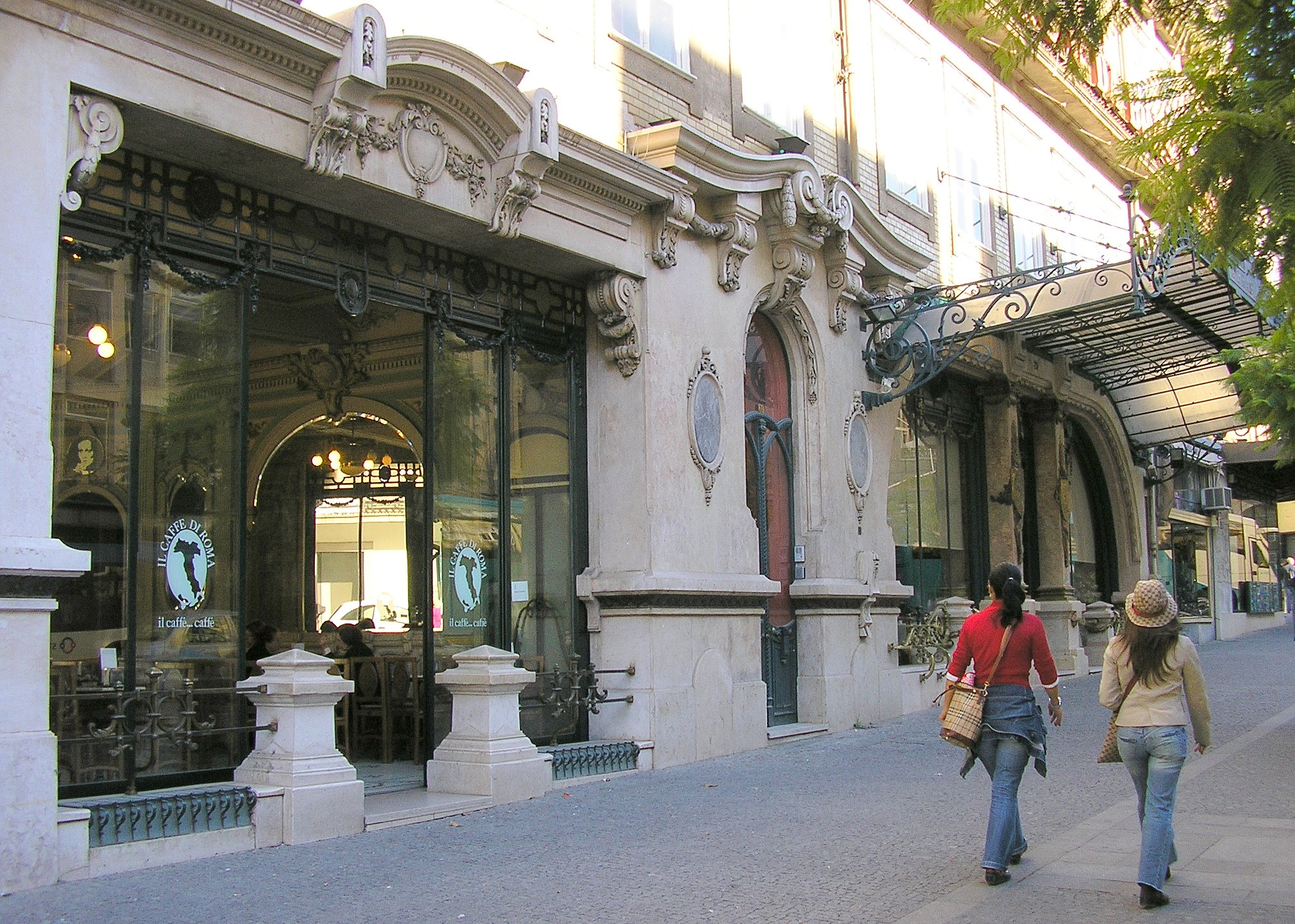 "A Brasileira" café in Porto, Portugal